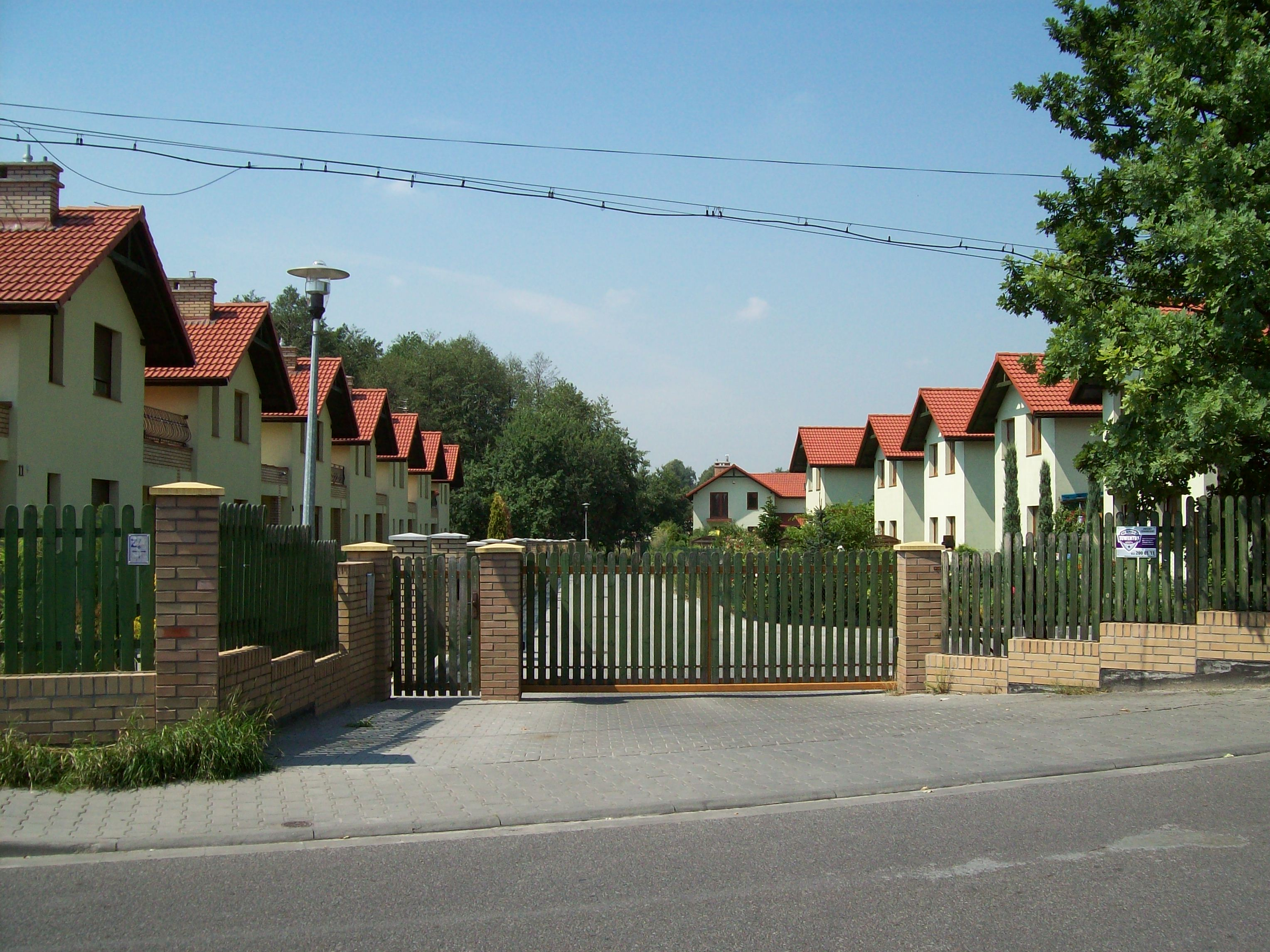 Nowe osiedle deweloperskie, ul. Kornasa w Katowicach Piotrowicach